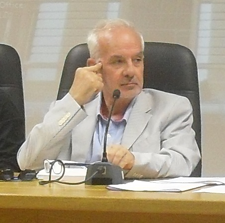 Giuseppe Meloni, storico medievista e docente italiano